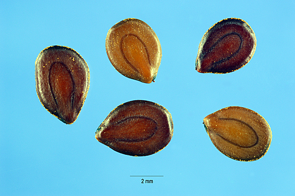 Desmanthus illinoensis seeds